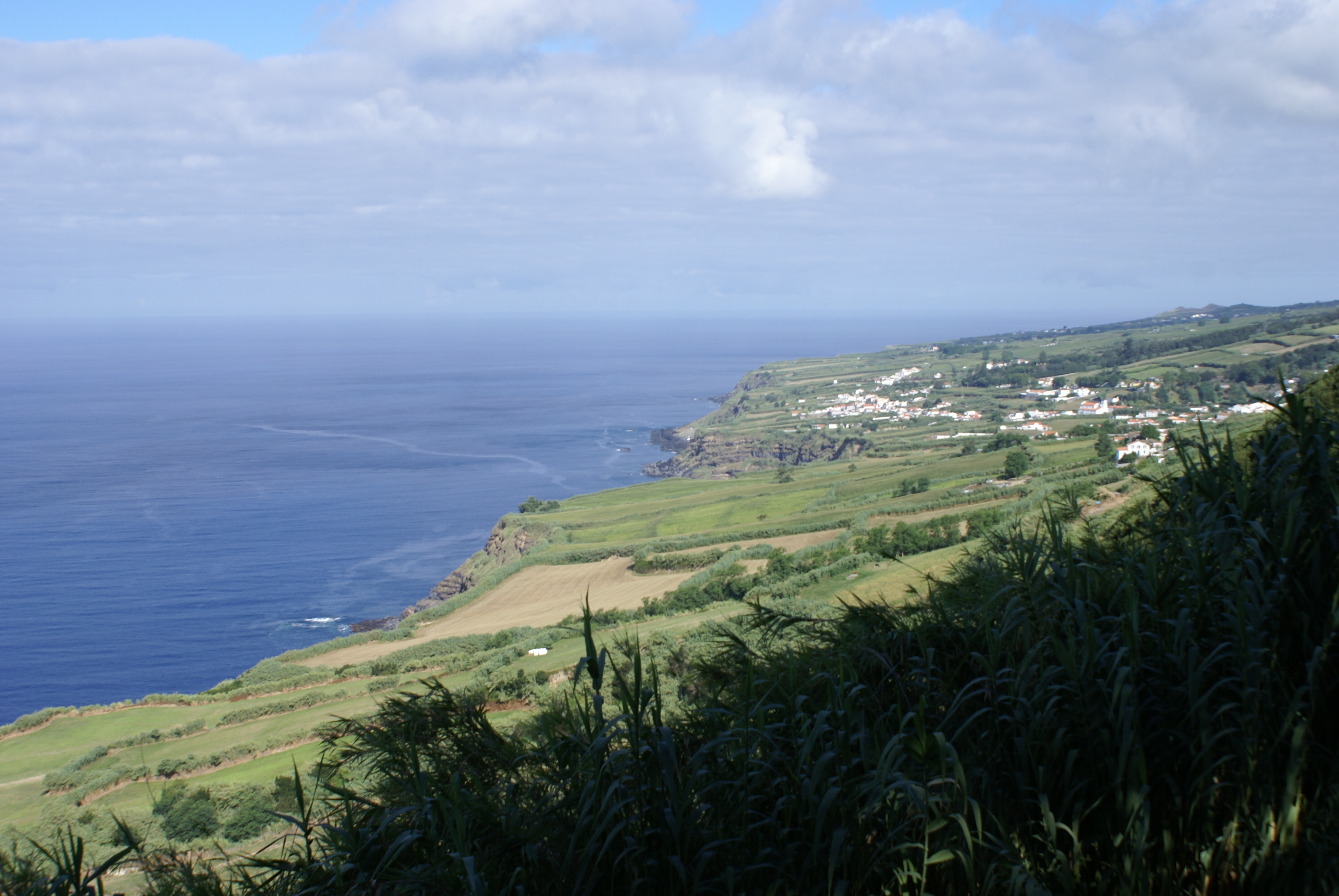 Miradouro do Caminho Novo, Feteiras, Ponta Delgada, ilha de São Miguel, Açores